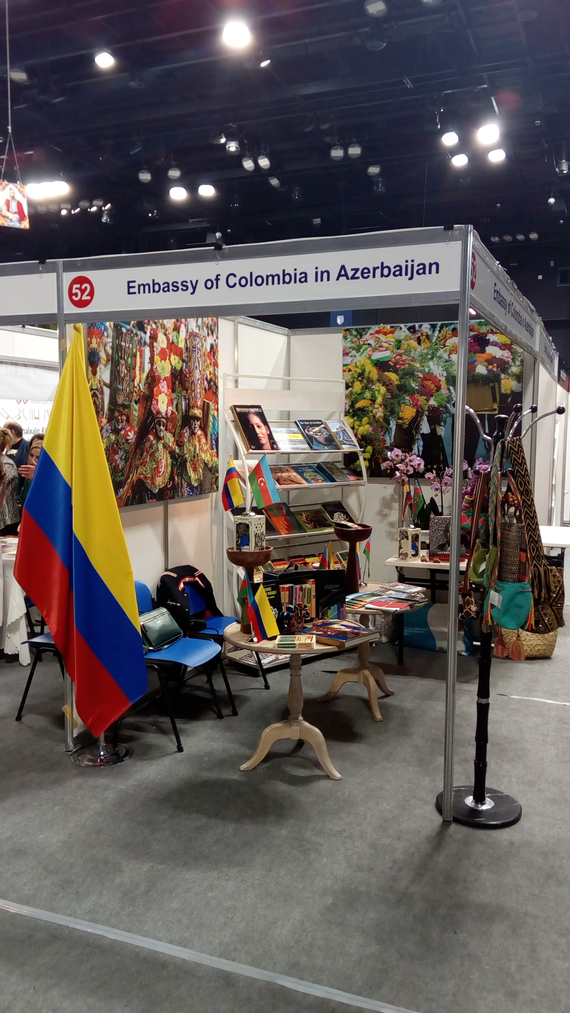 V Bakı Beynəlxalq Kitab Sərgi-Yarmarkası